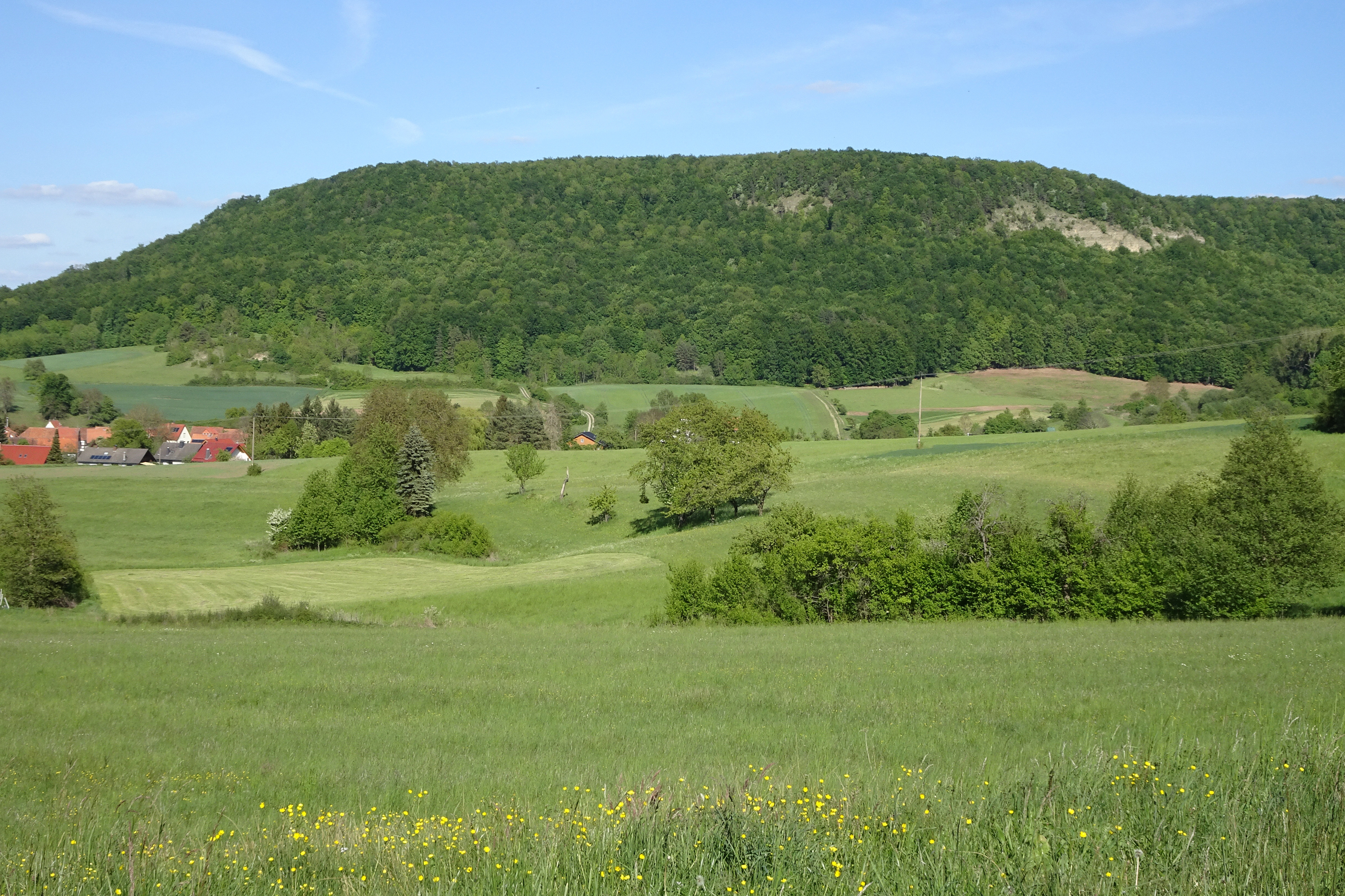 Das Naturschutzgebiet „Dreiherrenstein-Eschenberg-Kreutzerberg“ liegt im nordhessischen Werra-Meißner-Kreis und erstreckt sich entlang der Landesgrenze zu Thüringen. Das von Bergen mit steilen Hängen, Felsen und Bergstürzen geprägte Gebiet besitzt naturnahe Buchenwälder, Felsfluren, Feuchtwiesen und extensiv bewirtschaftete Offenlandbereiche. Als national bedeutsam für den Schutz seltener und bestandsgefährdeter Tier- und Pflanzenarten der Kalkbuchenwälder eingestuft, wurde der Bereich im Frühjahr 1998 zum Naturschutzgebiet erklärt und später als ein Teilbereich des Flora-Fauna-Habitat-Gebiets „Kalkberge bei Röhrda und Weißenborn“ in dem europaweiten Netz von Schutzgebieten „Natura 2000“ verankert. Das Naturschutzgebiet ist 209,38 Hektar groß, hat die nationale Kennung 1636036 und den WDPA-Code 318304.